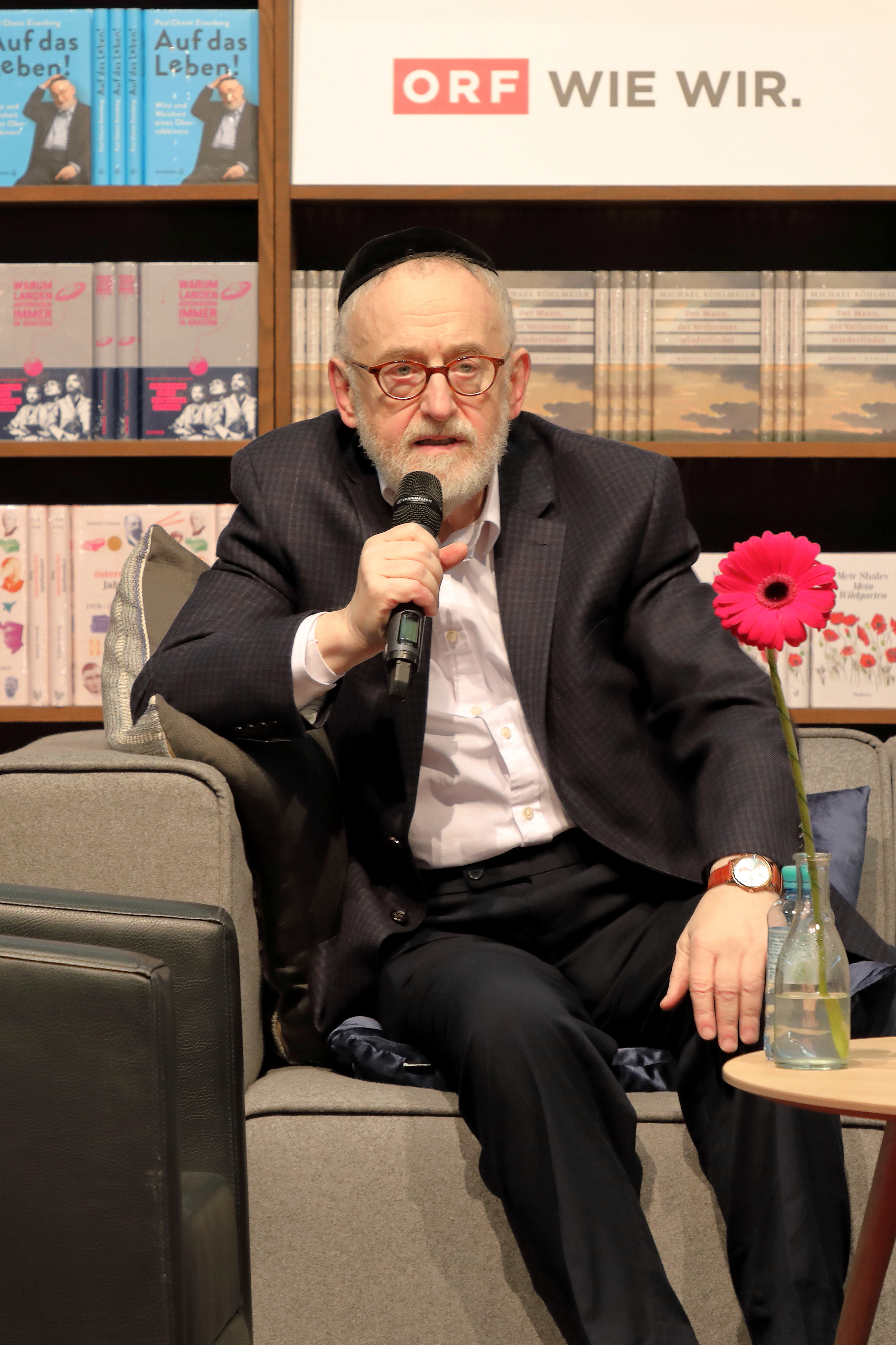 Oberrabbiner Paul Chaim Eisenberg bei der Präsentation seines Buches Auf das Leben! auf der ORF-Bühne der Wiener Buchmesse 2017.